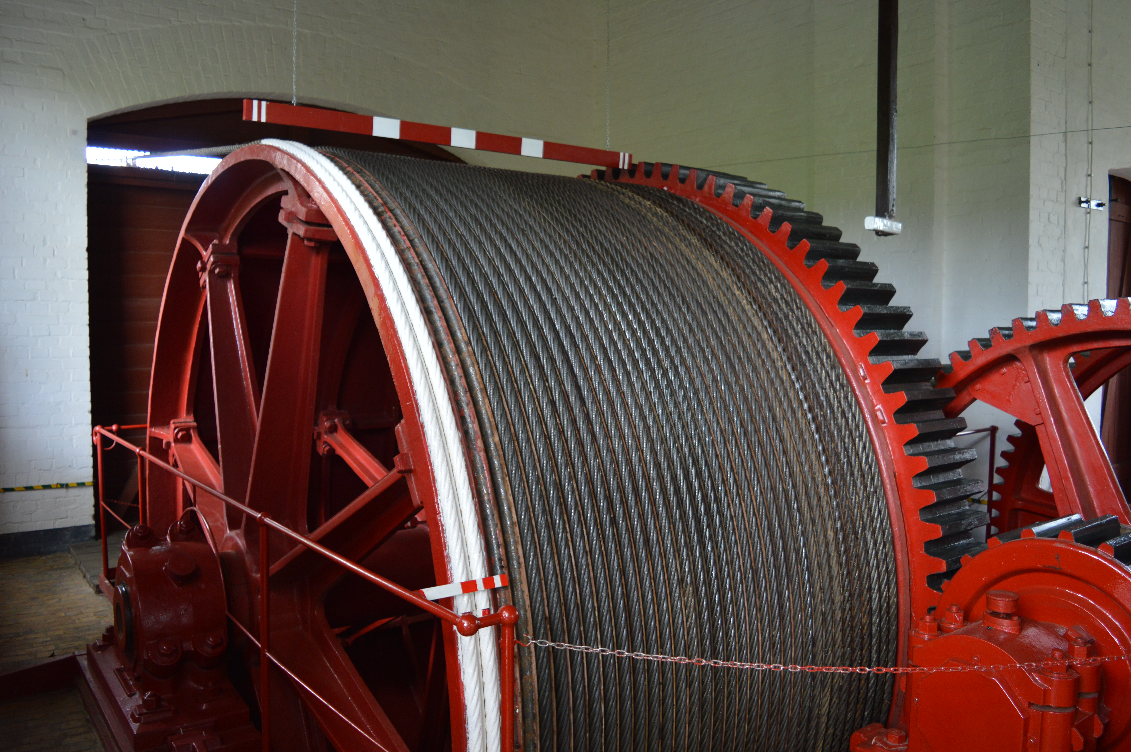 województwo warmińsko-mazurskie, Kanał Elbląski Wikidata has entry Q5637 with data related to this item.